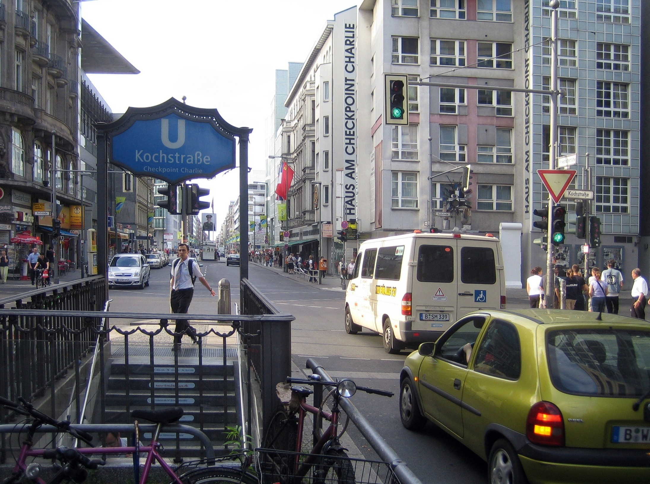 Berlin Friedrichstrasse, Kreuzung Kochstrasse.